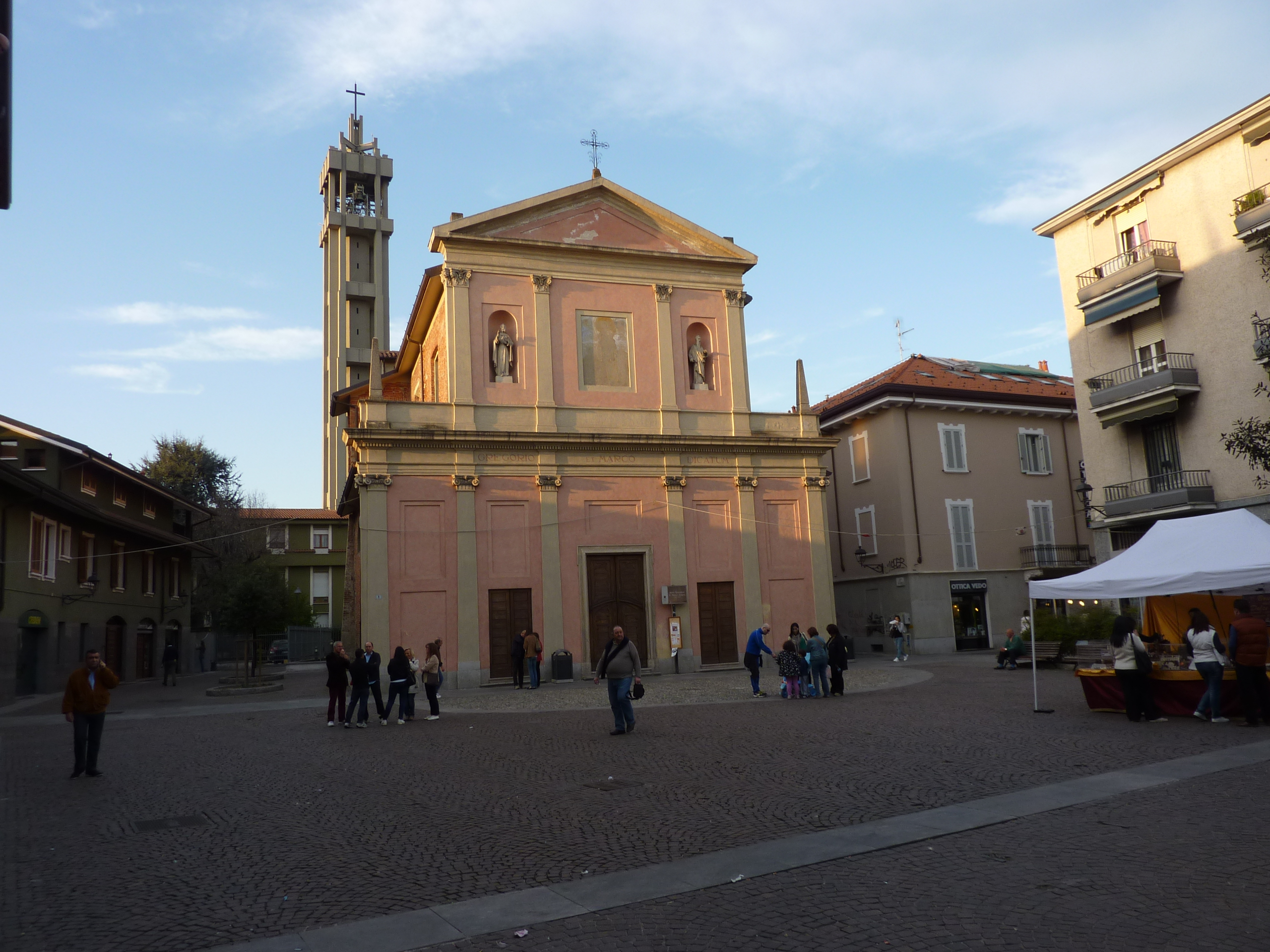 Piazza 11 febbraio a Cologno Monzese, con la chiesa parrocchiale dei SS. Marco e Gregorio